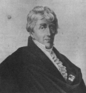 Franz Gerhard Wegeler (1765-1848), Mediziner und Jugendfreund von Ludwig van Beethoven.